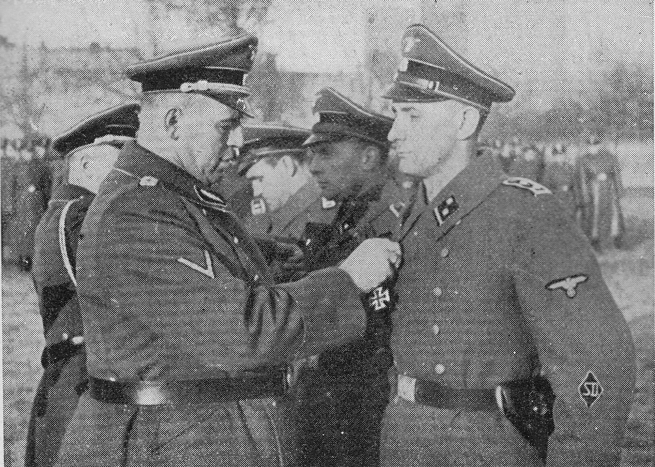 Dekorowanie odznaczeniami funkcjonariuszy Sicherheitspolizei (Sipo) z al. Szucha 25 w Warszawie